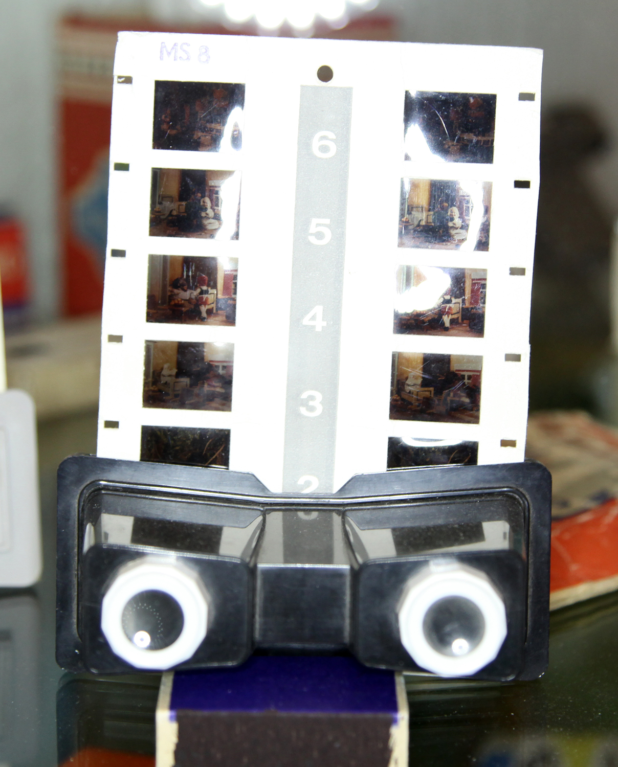 Betrachter für Stereobilder im DDR-Museum Pirna